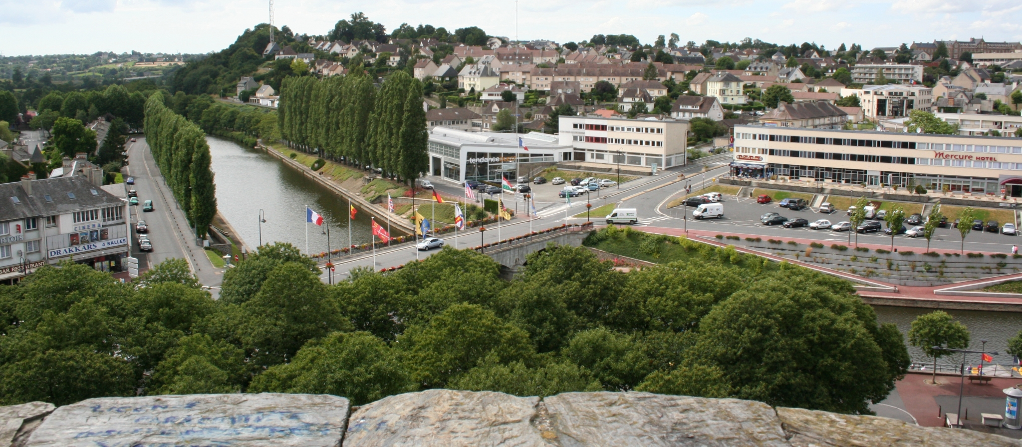 Façade de la radio Tendance ouest à Saint-lô, France